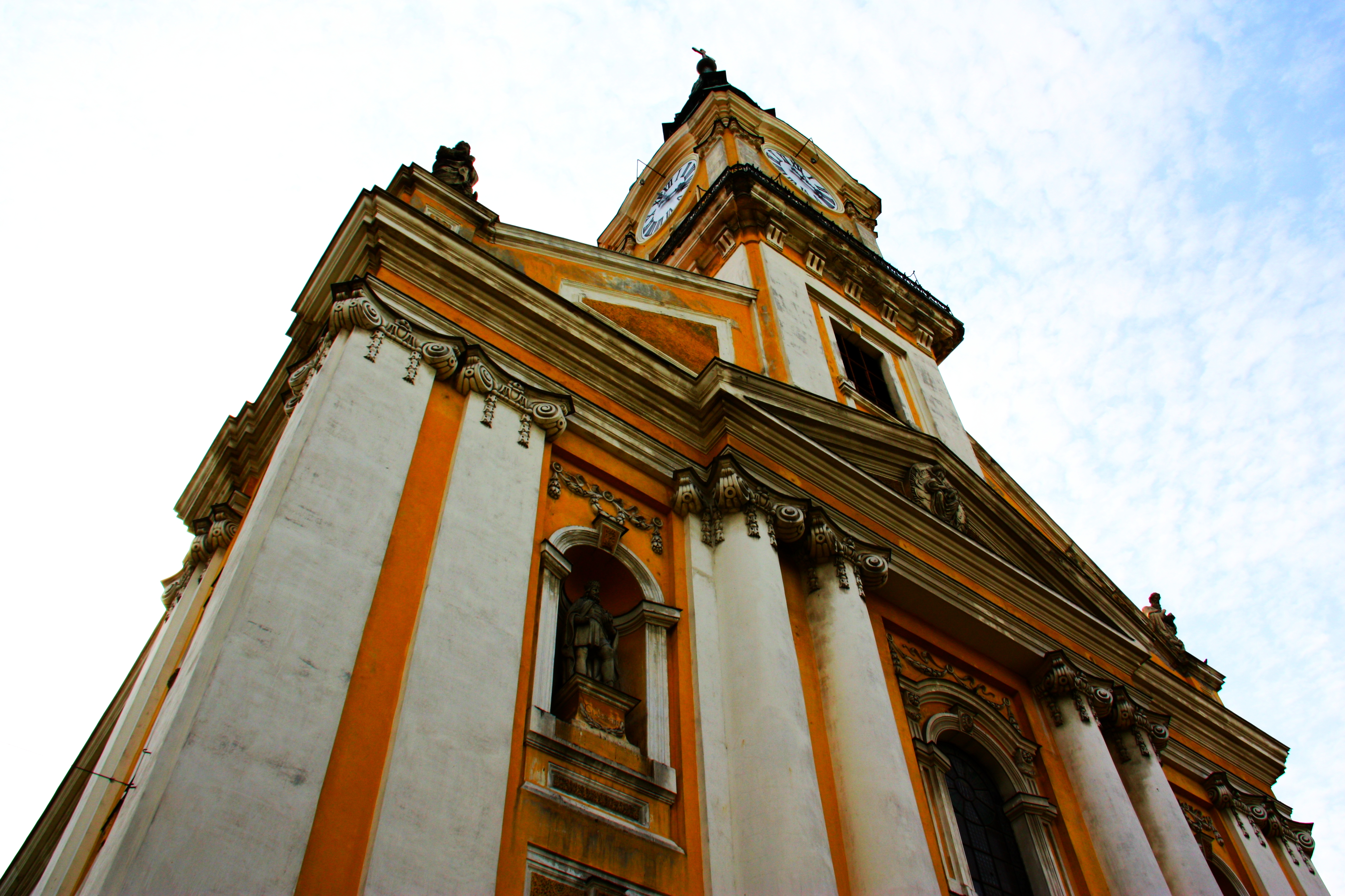 A kecskeméti Nagytemplom alulnézetből